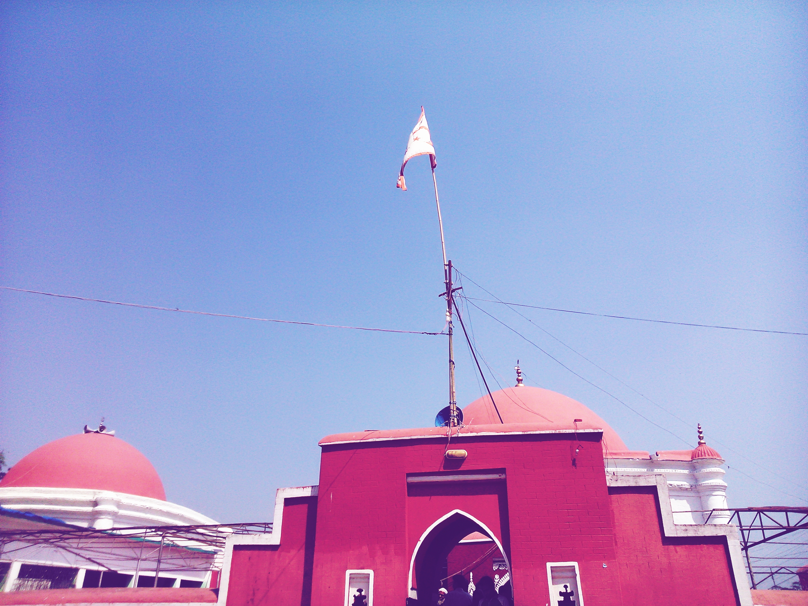 খান জাহানের সমাধির সম্মুখভাগ